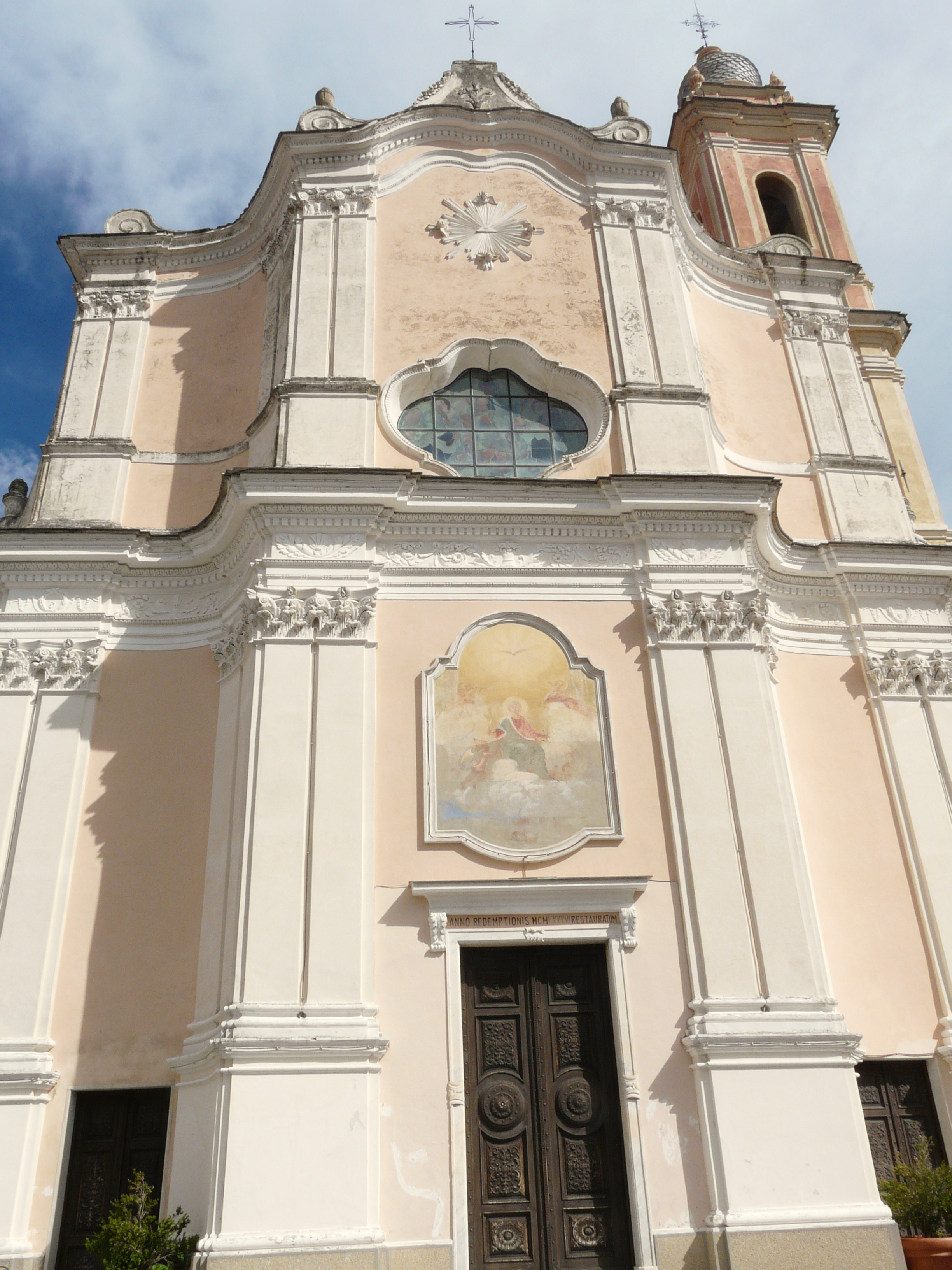 Chiesa di San Marco Evangelista, Civezza, Liguria, Italia